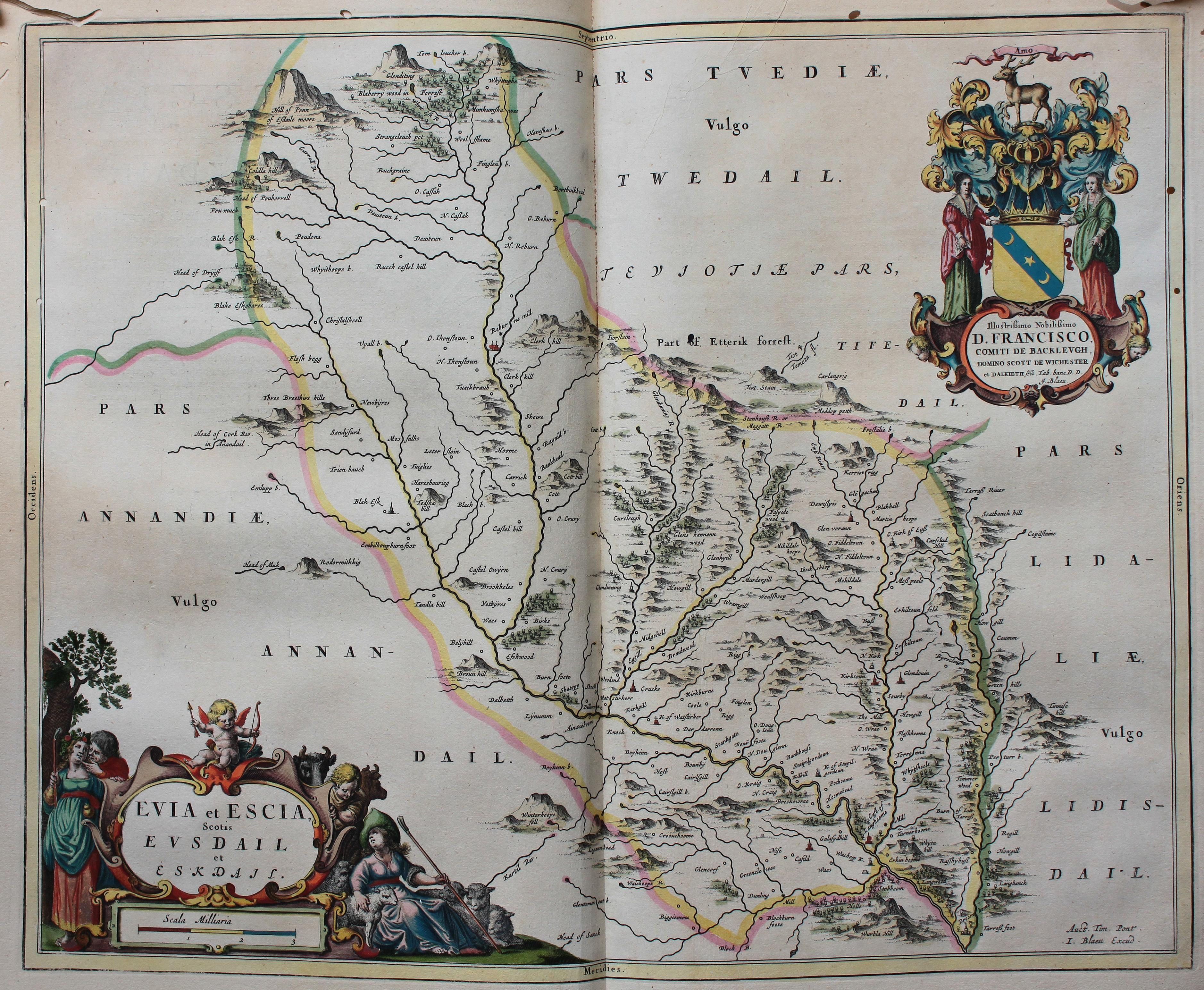 Descripción bibliográfica: Geographia Blaviana. - [Amsterdam : Juan Blaeu, 1659] . - [32], VI, 96 p., 34 f., h. 35a, 35b, 35c, 35d, 36-44 f., 34, [2], 36-40, [2], 43-70 [i. e. 75], [1] f., [20] p. de map., [9] f. de map., [4] f. pleg. de map., [2] f. de plan., [2] f. ge grab. : |bil. ; |cFol. marca major (57 cm.) . - En la dedicatoria a Felipe IV: "Presenta ... El Atlas Universal y Cosmographico de los orbes y terrestre ... Juan Blaeu" . - Título tomado del frontispicio. -- Privilegio fechado en 1659. -Errores de pag. - Sign.: 1, *2, **3, ***-****2, a-e2, A-I2, K1, L-Z2, Aa-Dd2, 4 2, Ee-Ff2, A-I2, K1, L2, M1, N-Y2, Z5, Aa-Dd2, Ee1, A-D2, E-F1, G-I2, K-L1, M-O2, P1, Q-Z2, Aa-Bb2, Cc1, Dd3, Ff-Zz2, Aaa-Bbb2, . - Frontispicio grab. col. -- Incluye un total de 49 il. entre map., plan. i grab. Materia: Atlas - Obras anteriores a 1800 Impresor: Blaeu, Joan, 1596-1673, imp. Lugar de impresión: Holanda. Amsterdam Localización: Vea la ilustración en su contexto Visite también la exposición "Cartografía histórica en la Biblioteca de la Universidad de Sevilla"